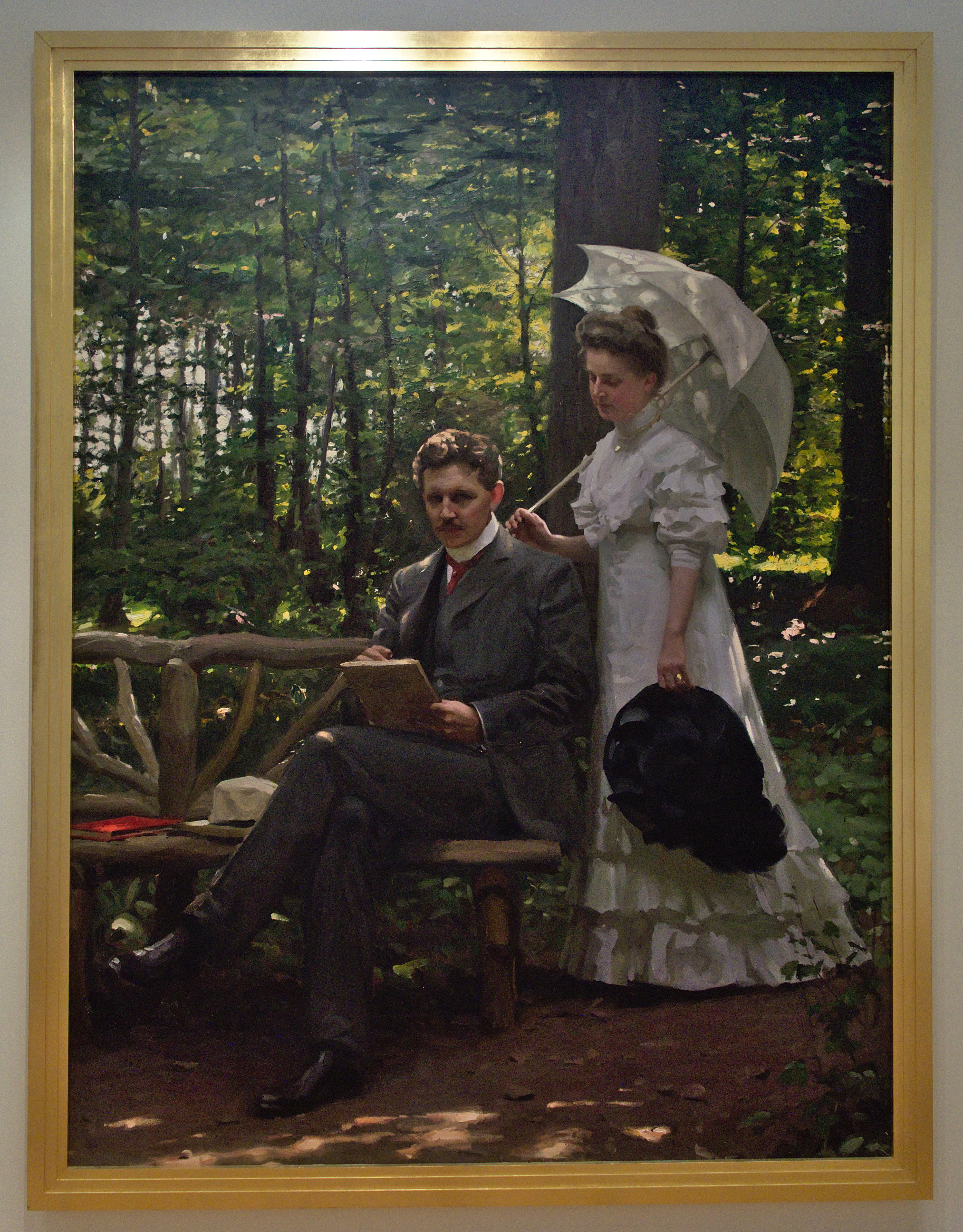 Emil och Emelie Östermantitle QS:P1476,sv:"Emil och Emelie Österman" label QS:Lsv,"Emil och Emelie Österman"